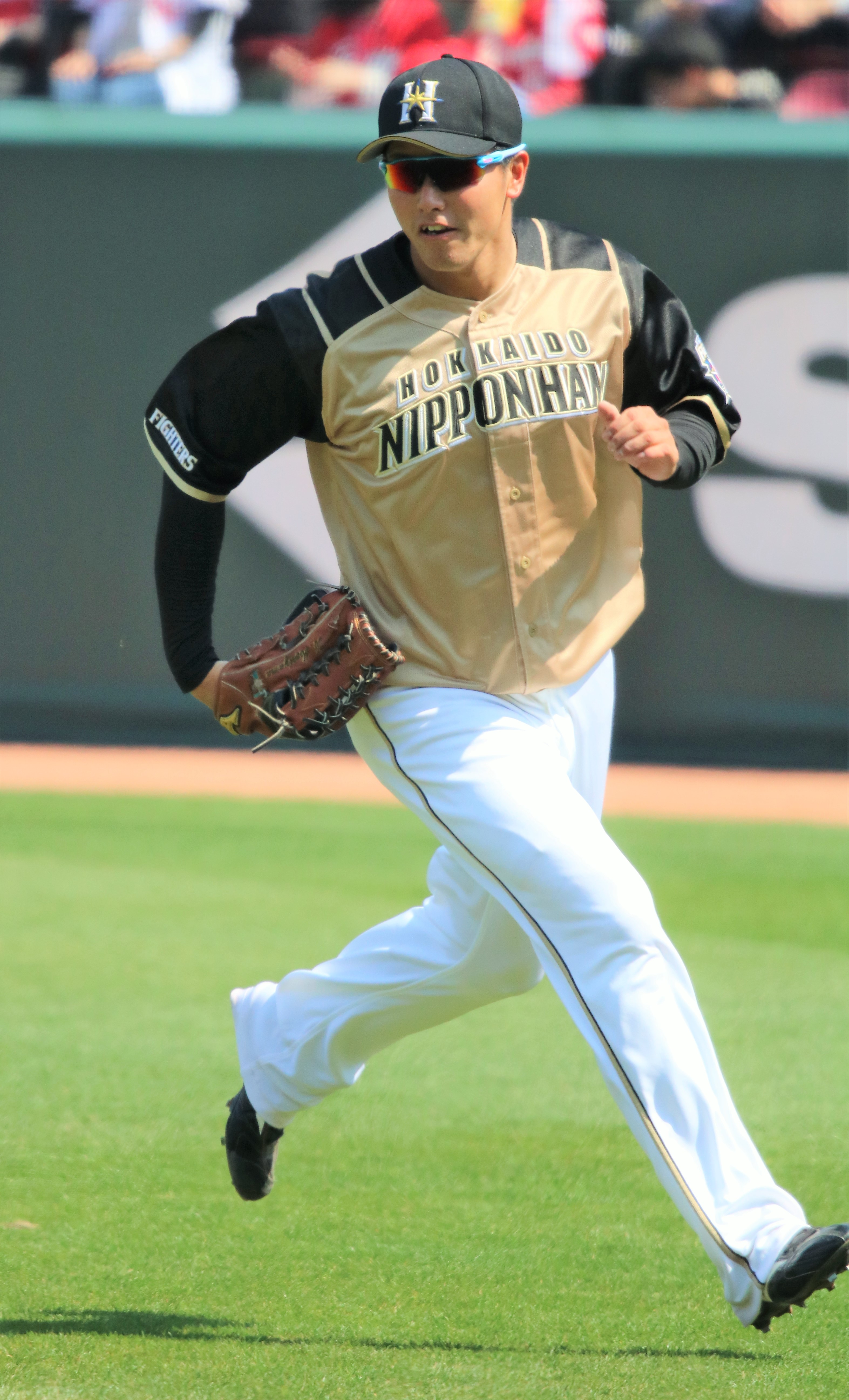 2018/3/14 マツダスタジアム